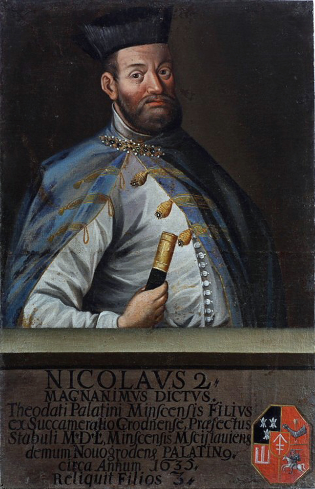 Беларуская (тарашкевіца): Партрэт Мікалая Сапегі (Mikałaj Sapieha) гербу «Ліс» (1558—1638), дзяржаўнага дзеяча Вялікага Княства Літоўскага, ваяводы менскага і наваградзкага.